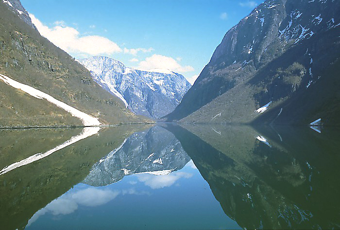 De Sognefjord